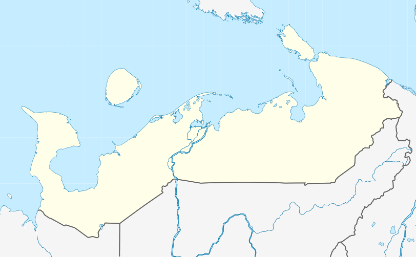 Административная карта Ненецкого автономного округа (Россия). Проекция: Меркатор Координаты для GMT: -R42.0/66.5/65.4/71.0 Инструменты: GMT, Inkscape